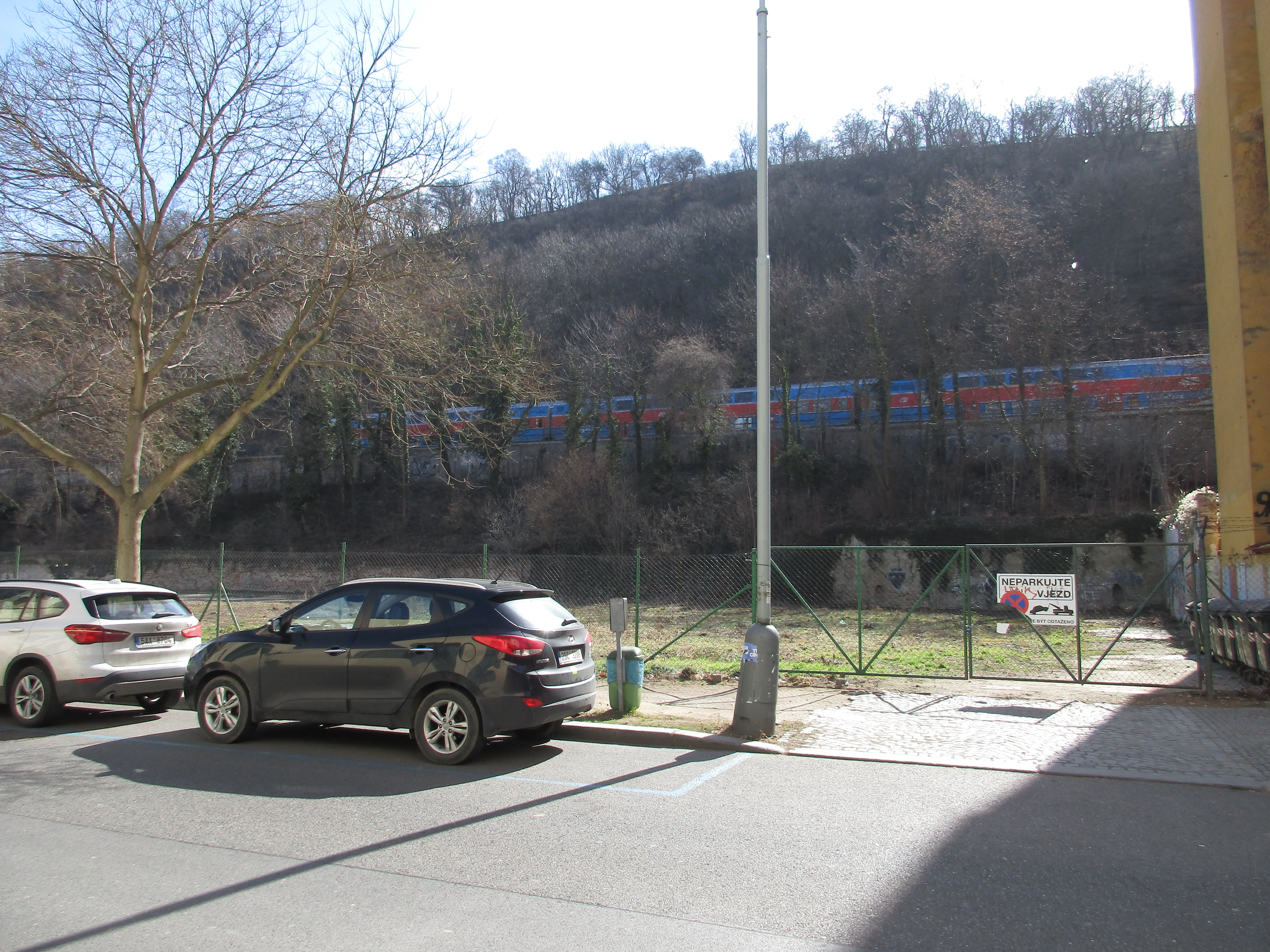 Pernerova 9 - zbořeniště empírové stavby v místě bývalé viniční a hospodářské usedlosti Putovka.